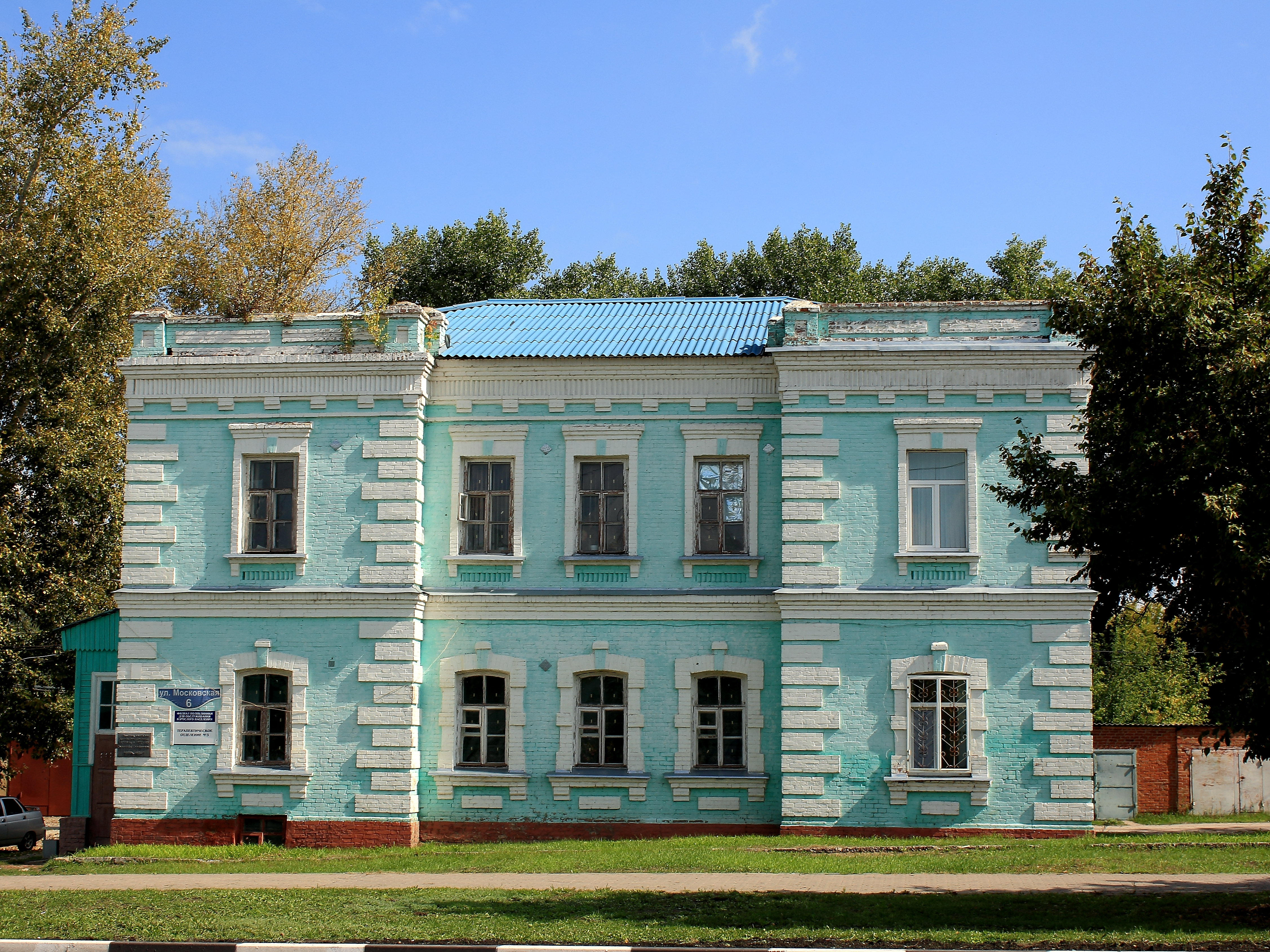 Амбулатория больницы (Белгородская область, Шебекино, Московская улица, 6)